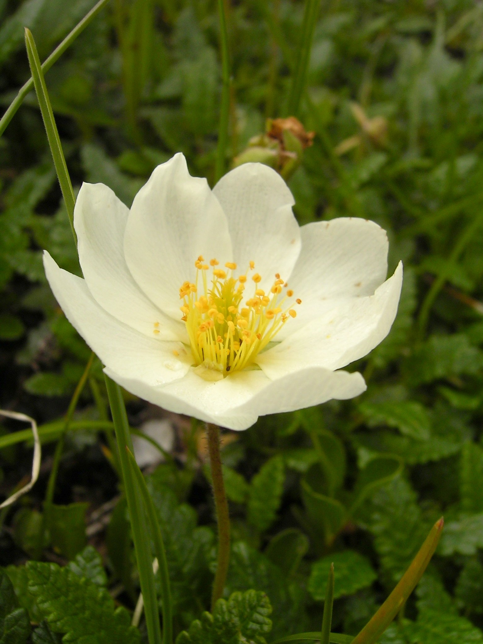 (de) Silberwurz (Dryas octopetala), aufgenommen im Sätteli, Gadmen (CH). Wegen den besonderen Lichtverhältnissen (Bewölkt, die Wolken waren nur etwa 100 m höher) strahlt die Blume nicht so wie «gewohnt». Bearbeitung: Mit GIMP Farbkurve angepasst und (v. a.) Farbwert verbessert